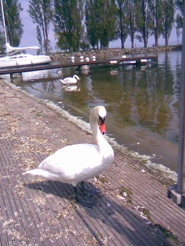 Porte d'auvernier, suisse, en 2012